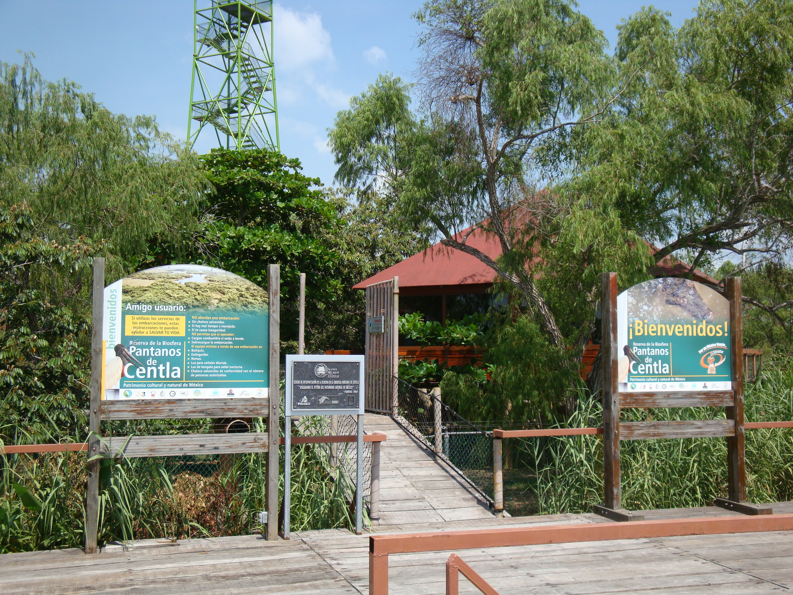 Entrada por el muelle. Reserva de la Biosfera "Pantanos de Centla", municipio de Centla, Tabasco, México.